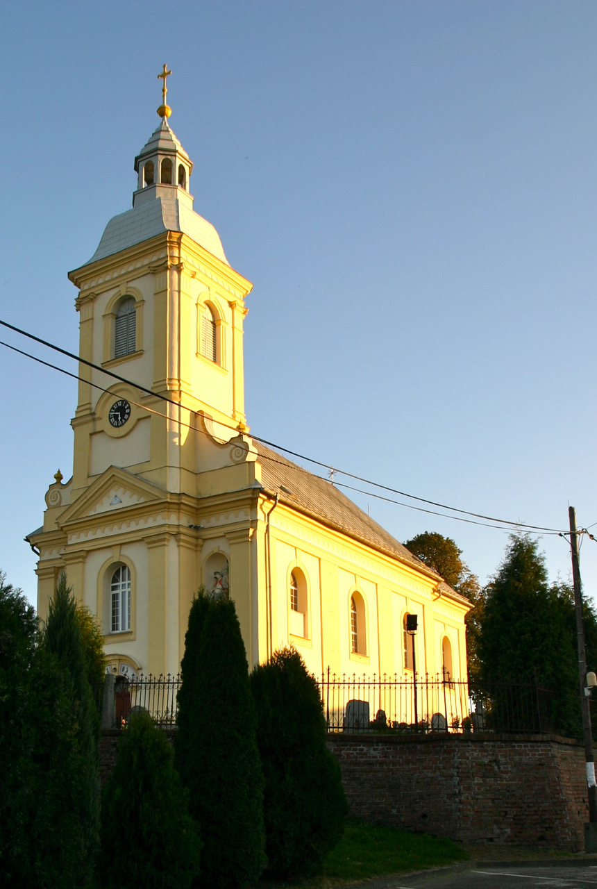 Ucieszków – kościół parafialny pw. Opatrzności Bożej (zabytek nr 1206/66 z 14.03.1966).